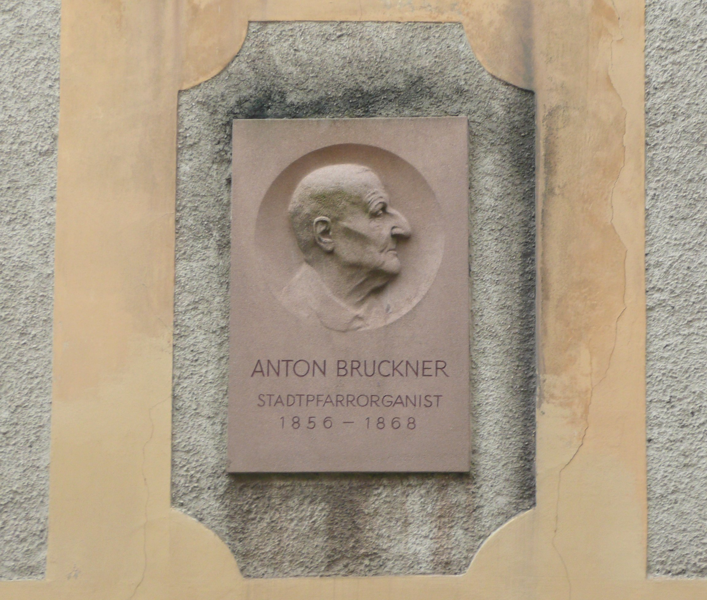 Gedenktafel für Anton Bruckner Stadtpfarrkirche Mariä Himmelfahrt in Linz